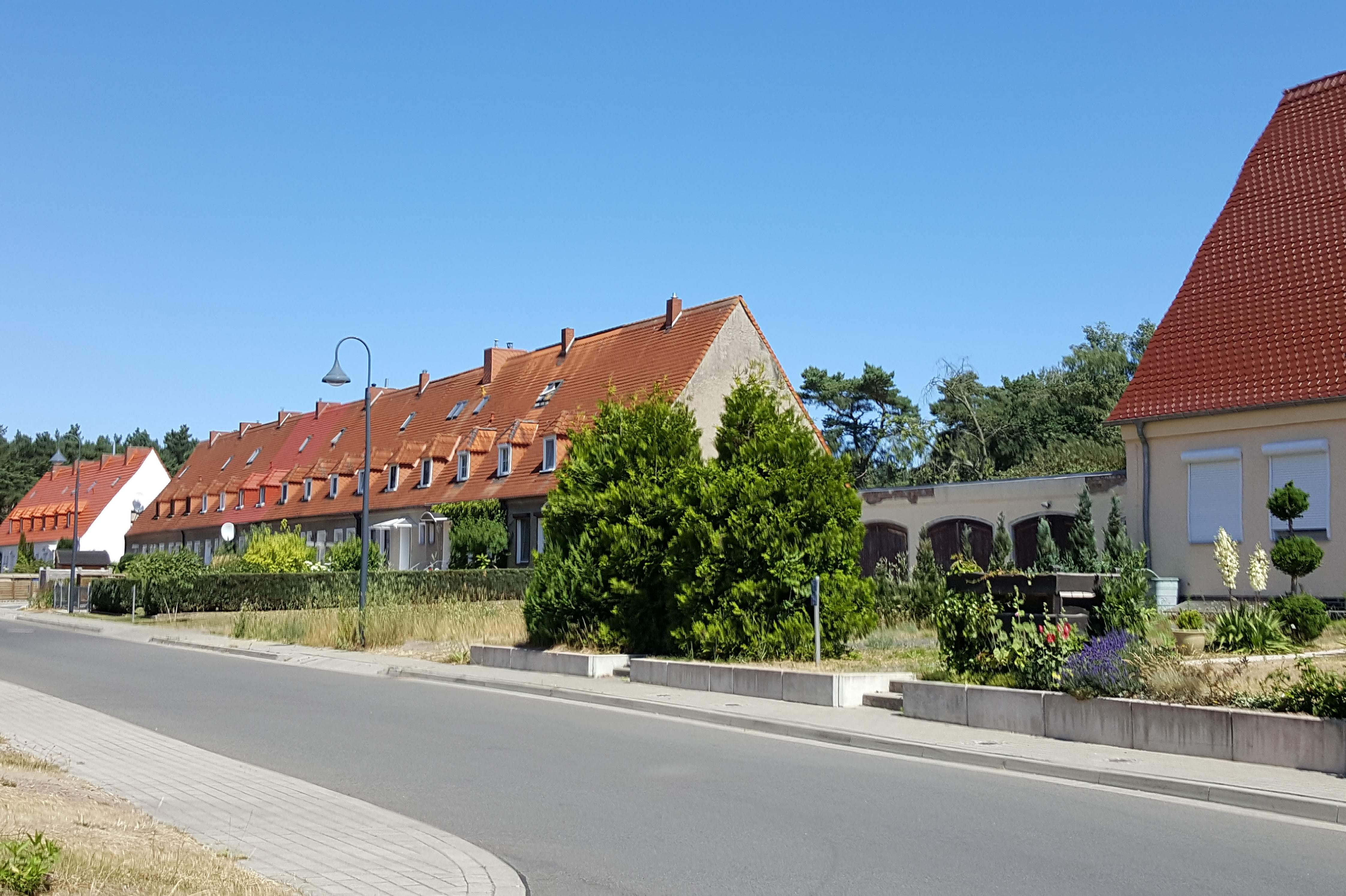 Teilstück der ehem. Werksiedlung der Heeresversuchsanstalt Penemünde (HVA) in Karlshagen, Waldstr.